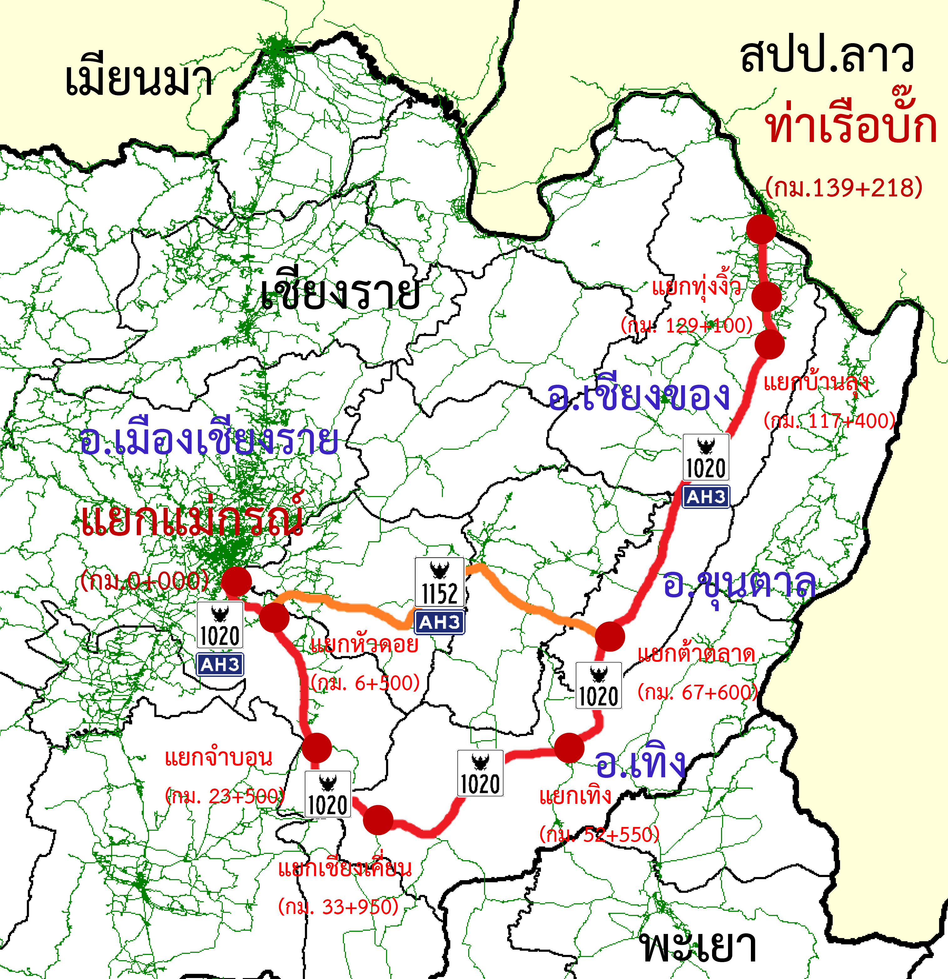 TH HW 1020 Map